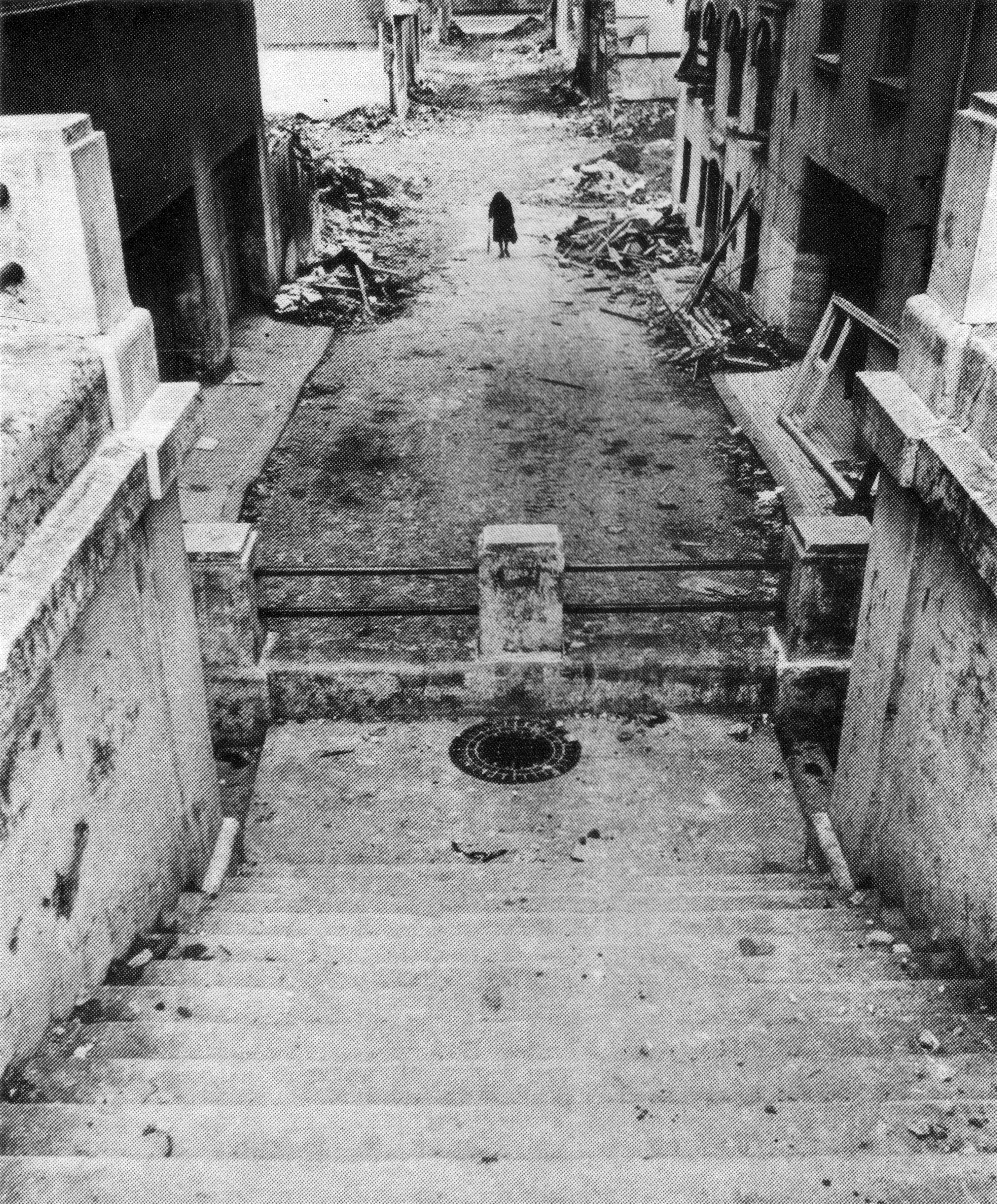 Fotografía de autor (ver fuente) que documenta el proceso de demolición del Pasaje Seaver, s/f (ca. 1980).